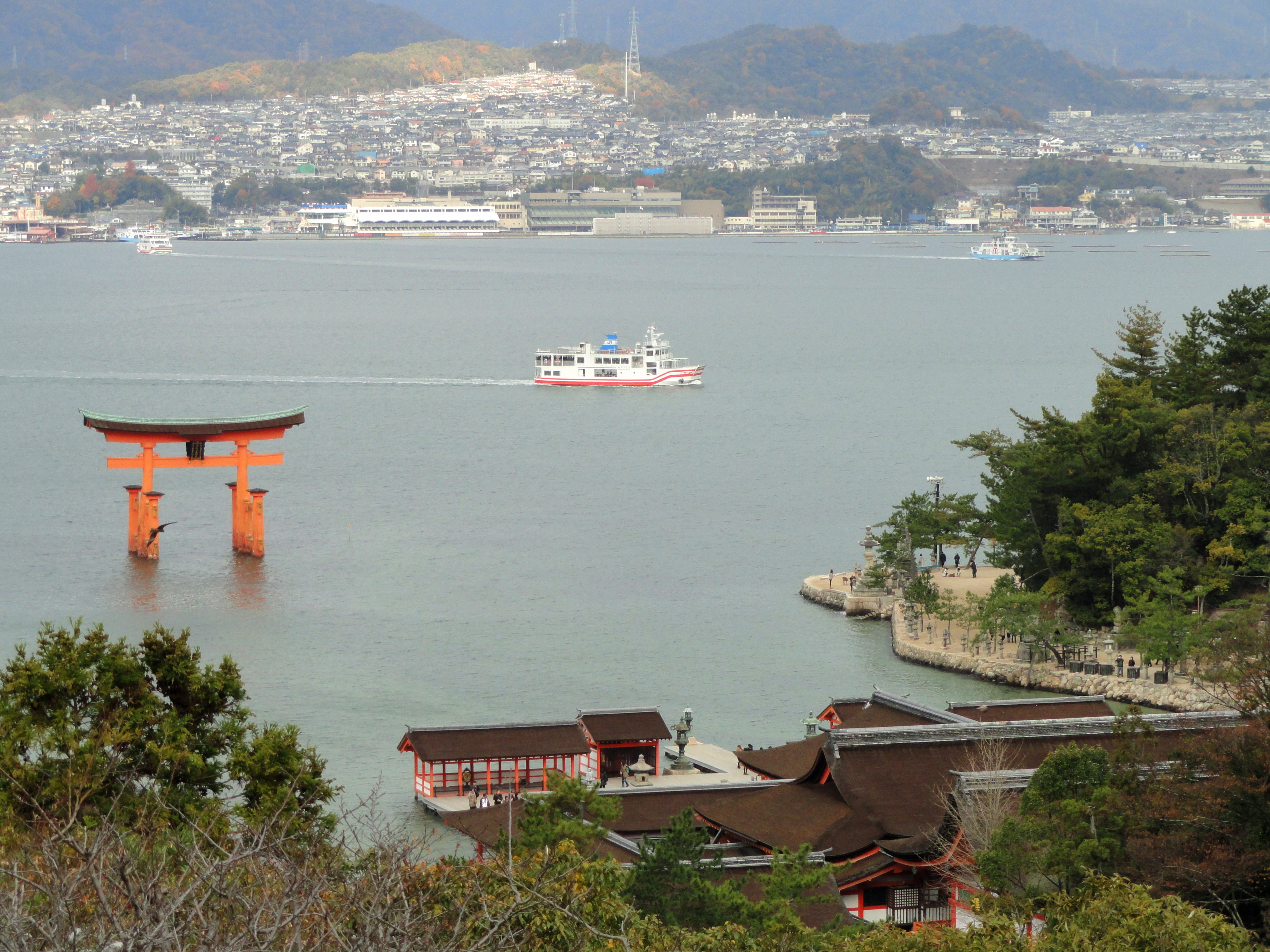 Itsukushima-jinja torii, Miyajima, Japan.